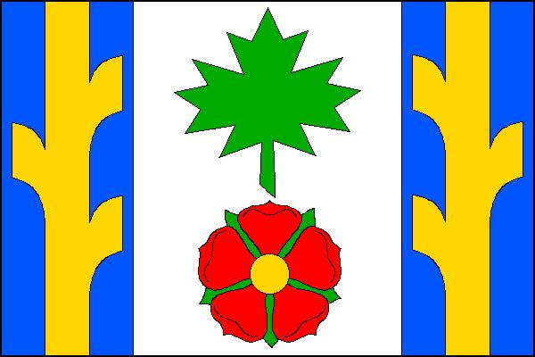 Vlajka obce Heřmánkovice